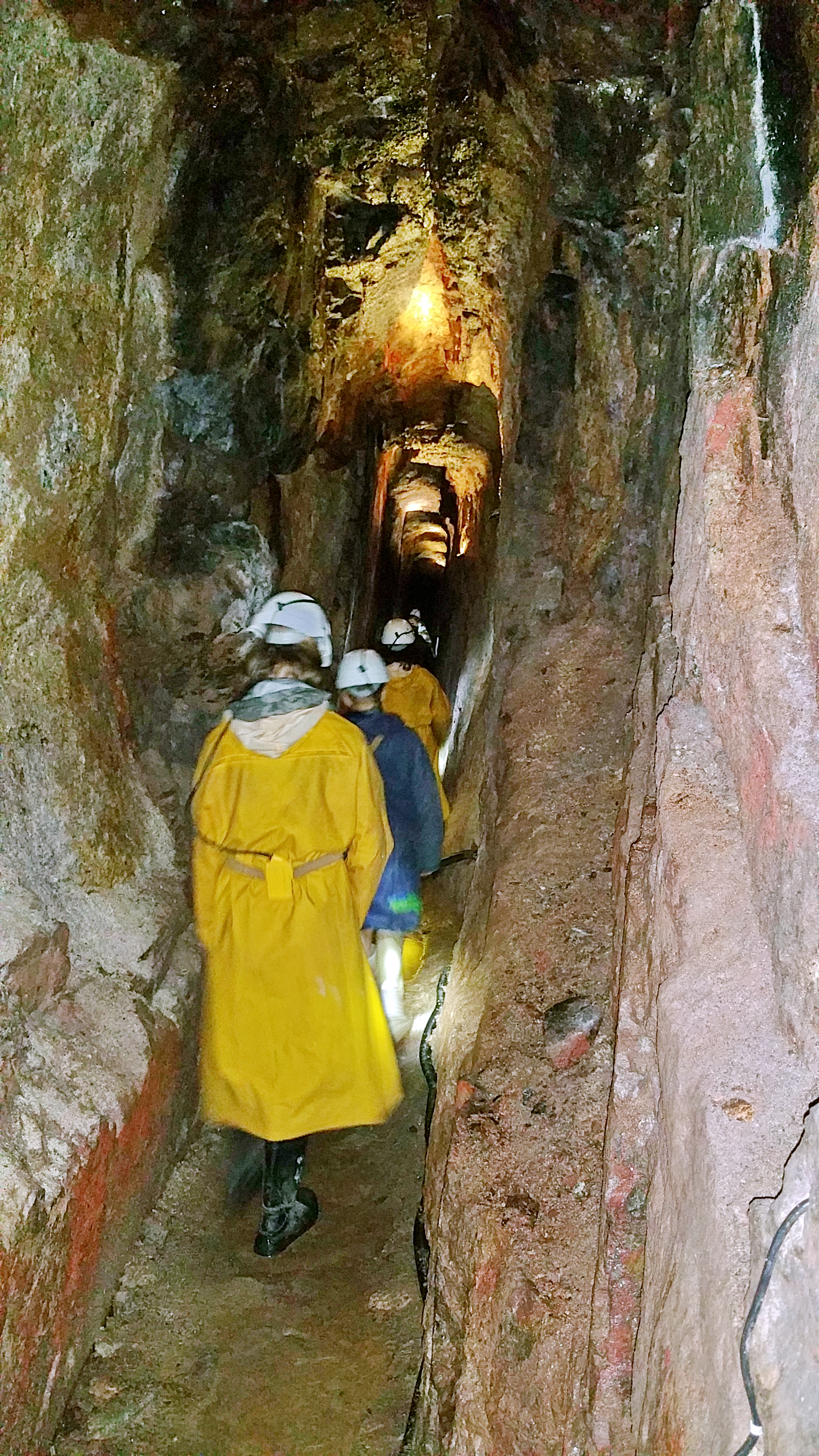 Cínový důl Mauritius, Hřebečná.